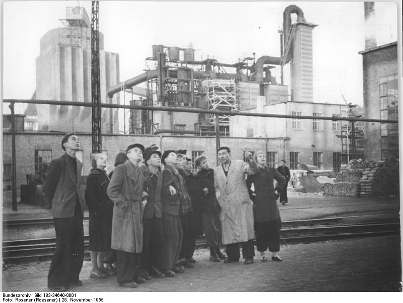 Magdeburg, Jugendstunde in einem Gaswerk Zentralbild Magdeburg 28.11.1955 Rösener Teilnehmer an den Jugendstunden zur Vorbereitung für die Jugendweihe besichtigen Großgaserei in Magdeburg Die Teilnehmer an den Jugendstunden des Bezirkes Nord in Magdeburg besichtigen an zwei Tagen im November die Großgaserei Magdeburg. Den Schülern und Jungen Pionieren sollten die Quellen der Energie in anschaulicher Weise gezeigt werden. Unter der Führung von Kollegen aus dem Betrieb bekamen sie einen Einblick in die Arbeit einer Großgaserei. Zum Abschluß hörten die Schüler noch einen Lichtbildvortrag über Atomenergie. Der Besuch des Werkes hat ihre Kenntnisse wesentlich bereichert. UBz: Ing. Röseler erklärt seinen aufmerksamen Zuhörern die verschiedenen Arbeitsvorgänge in der Großgaserei.